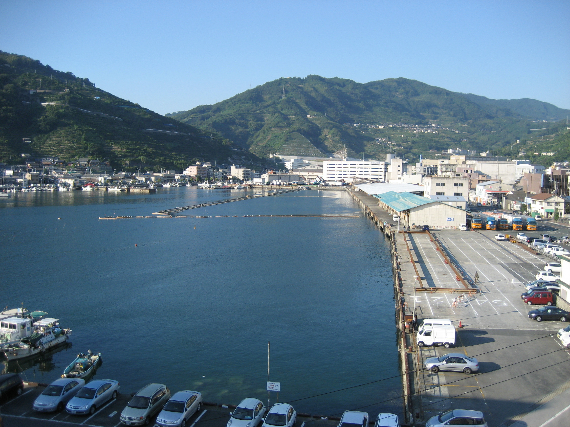 Yawatahama Port